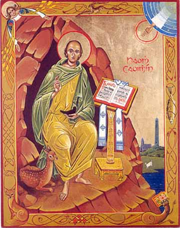 San Kevin (Coemgen) Abate di Glendalough (+618).